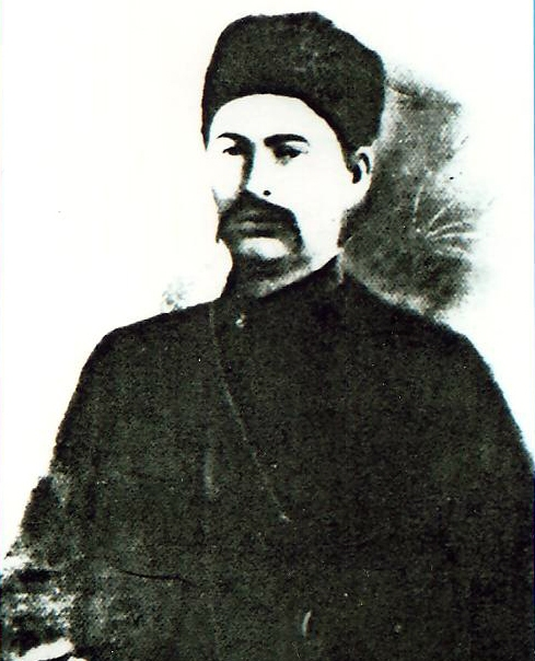 Qaçaq Kərəm